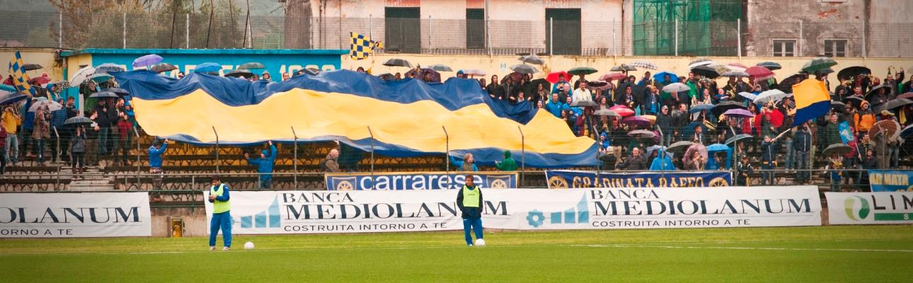 la tifoseria calorosa nel settore gradinata